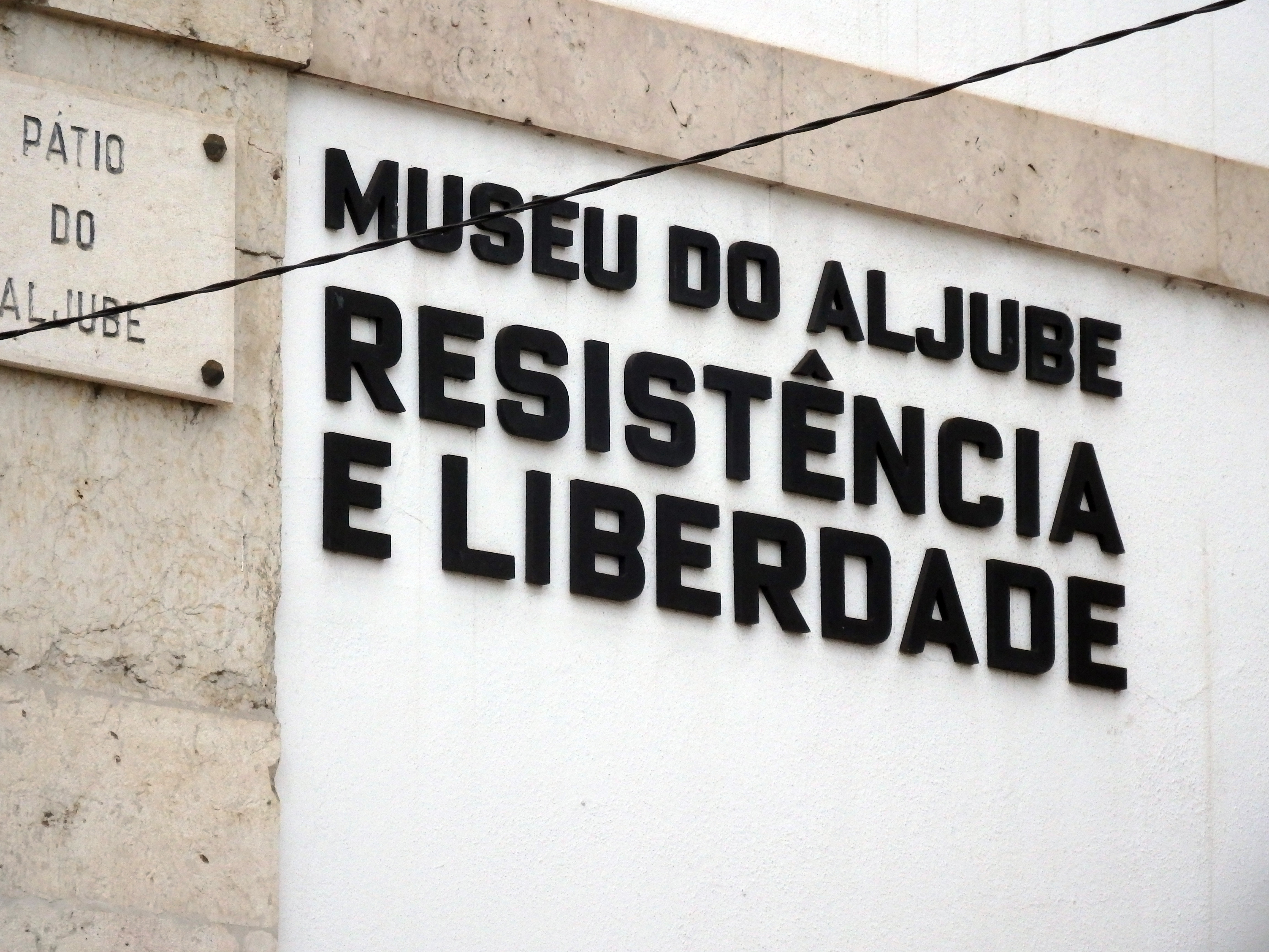 Descending from Castelo de Sao Jorge